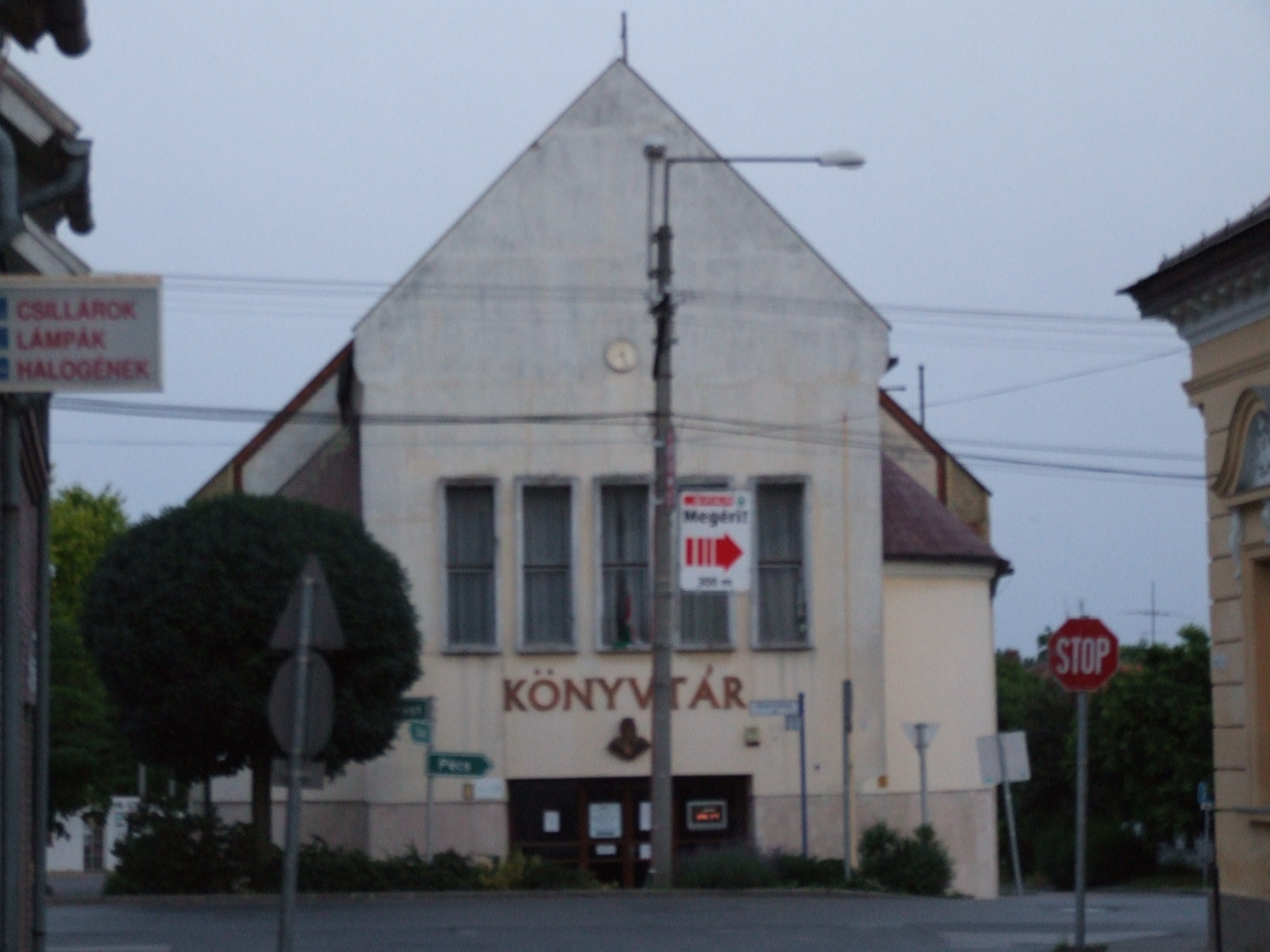 Könyvtár Paks